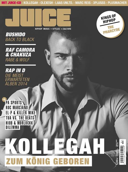 Kollegah auf dem Cover des Hip-Hop-Magazins „Juice“